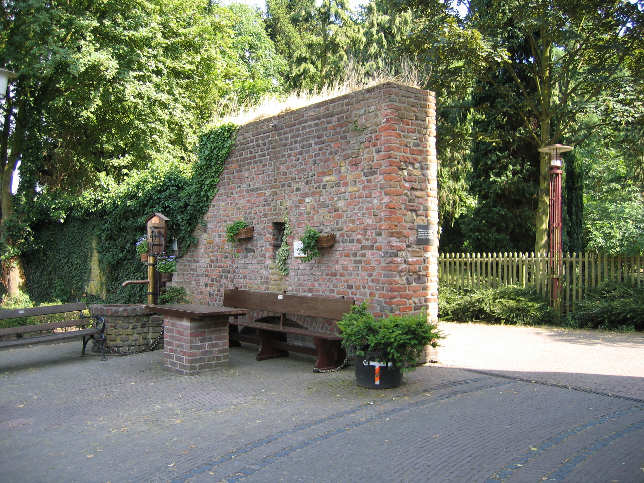 Stadtmauer am Pulverturm